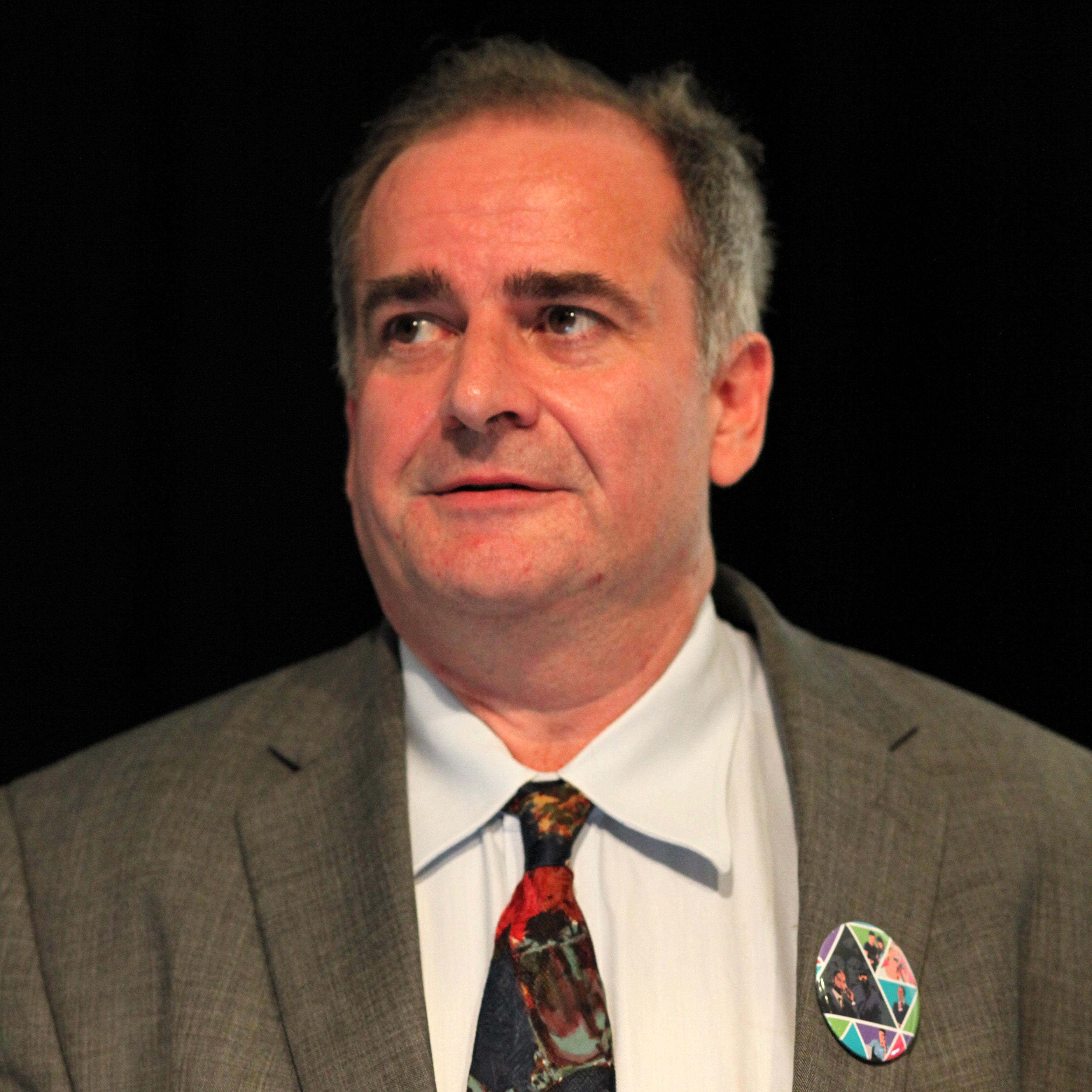 Caspar Bowden at the Congress on Privacy & Surveillance (CoPS213) at the École Polytechnique Fédérale de Lausanne.